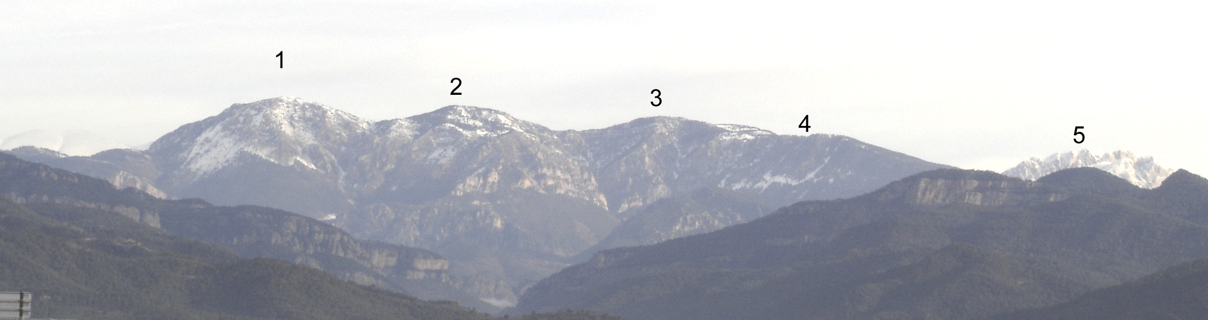 La Serra del Verd vista des de Solsona.1 - Cap del Verd2 - Cap de Prat d'Aubes.3 - Cap d'Urdet4 - Coll de Pradell5 - El Pedraforca